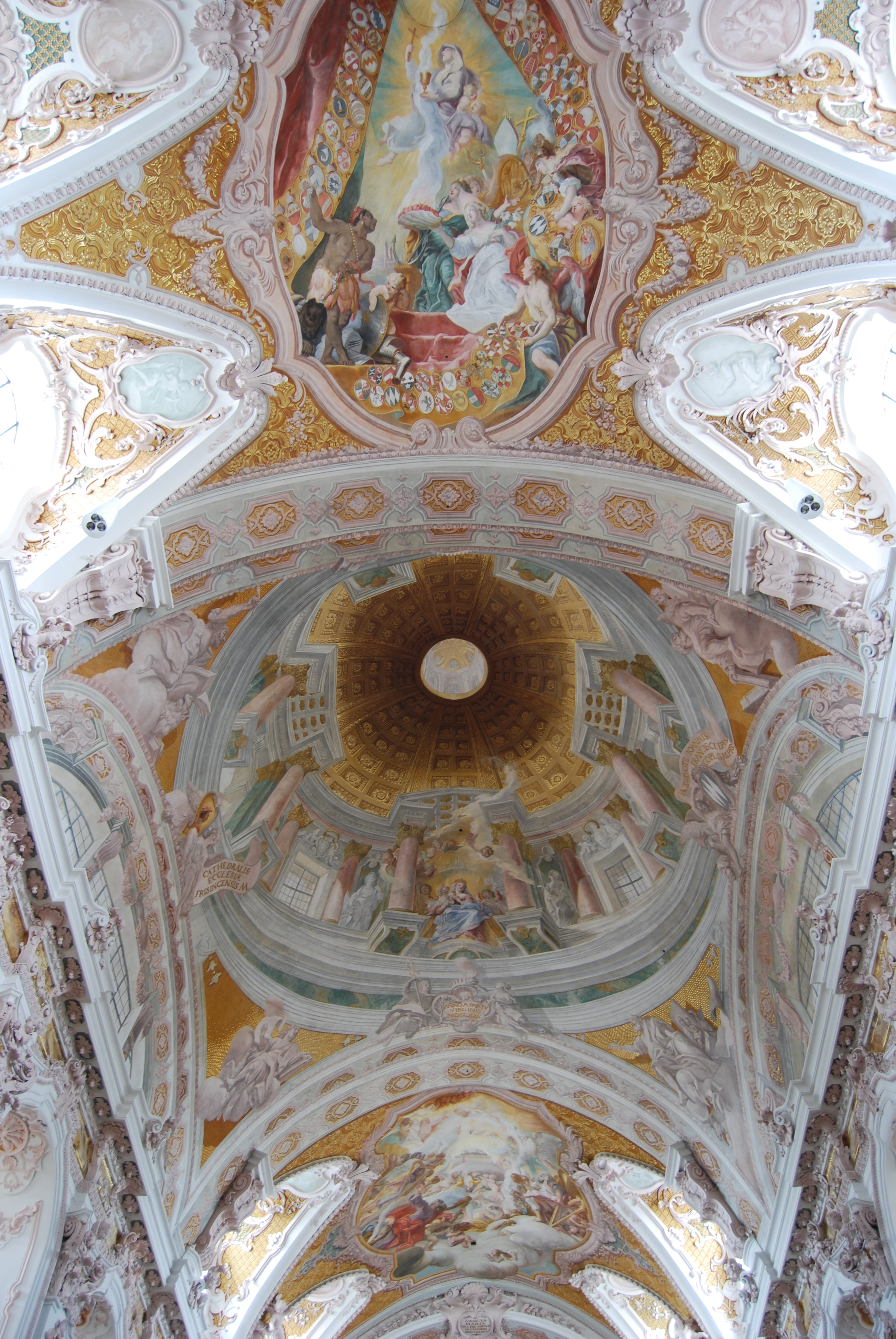 Teil des Deckenfreskos des Freisinger Doms.